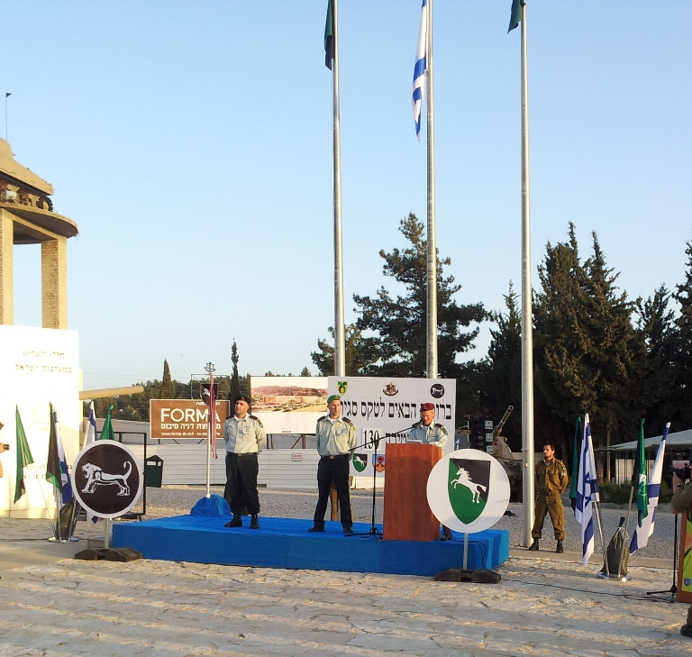 טקס סגירת חטיבה 130